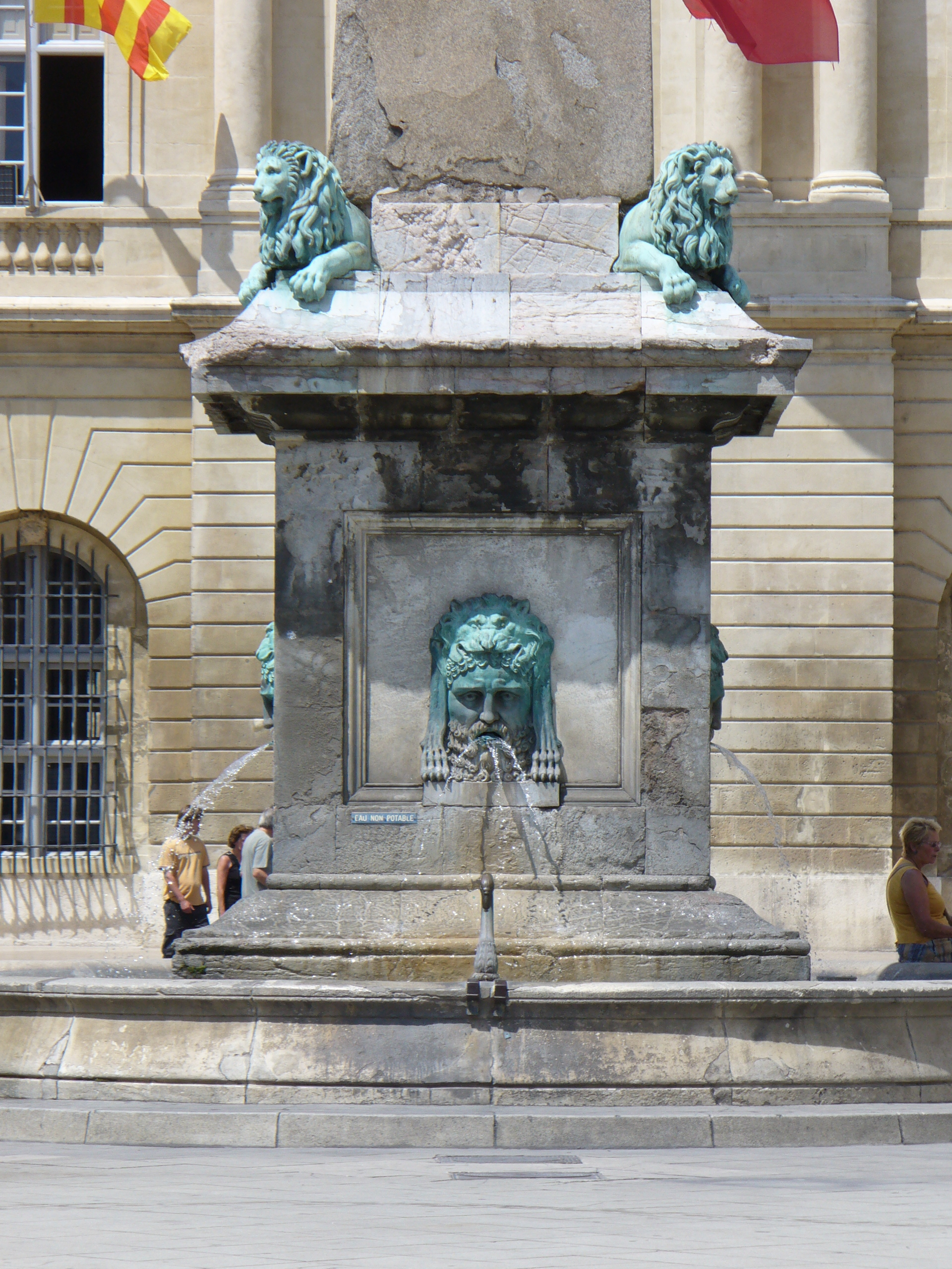 Place de la Republique dessen Mitte ein Brunnen krönt-Arles